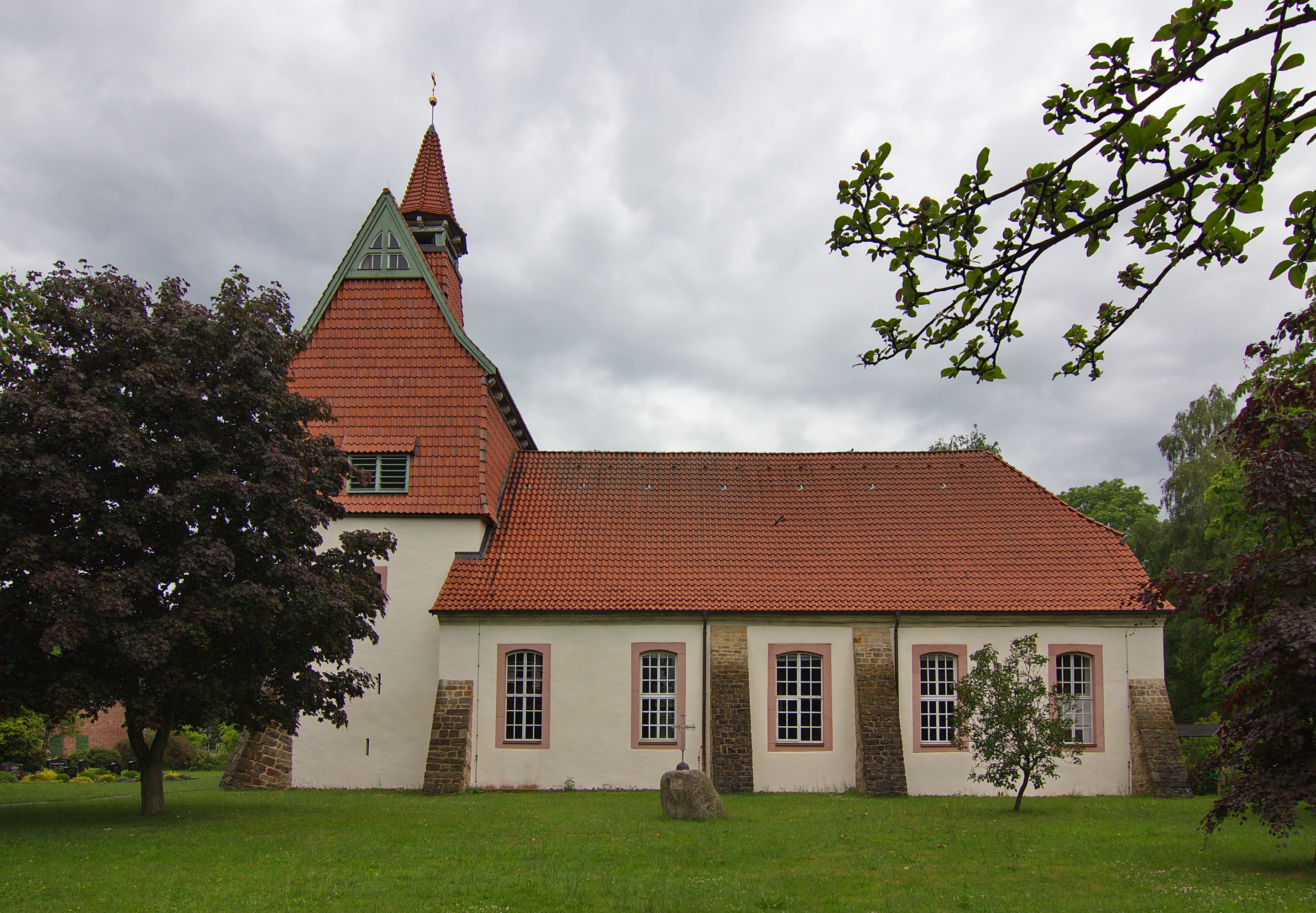 Kirche „Zum Guten Hirten“ in Schneeren (Neustadt a.Rbg.), Niedersachsen, Deutschland